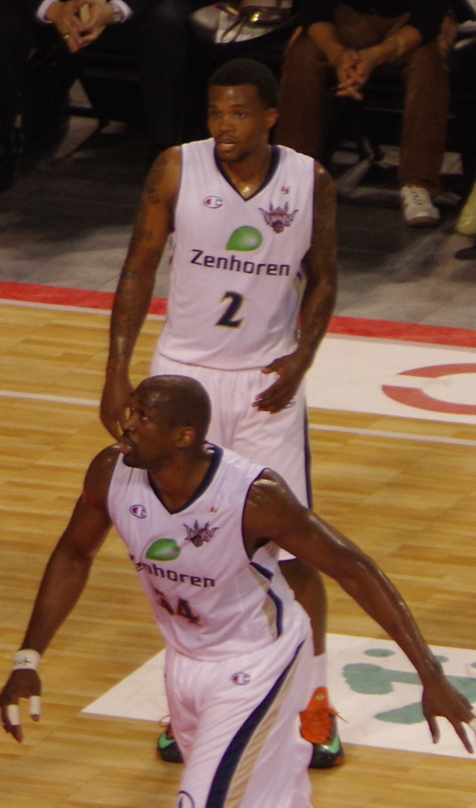 ｂｊリーグ 2013-2014シーズン プレイオフ ファイナルズ_025